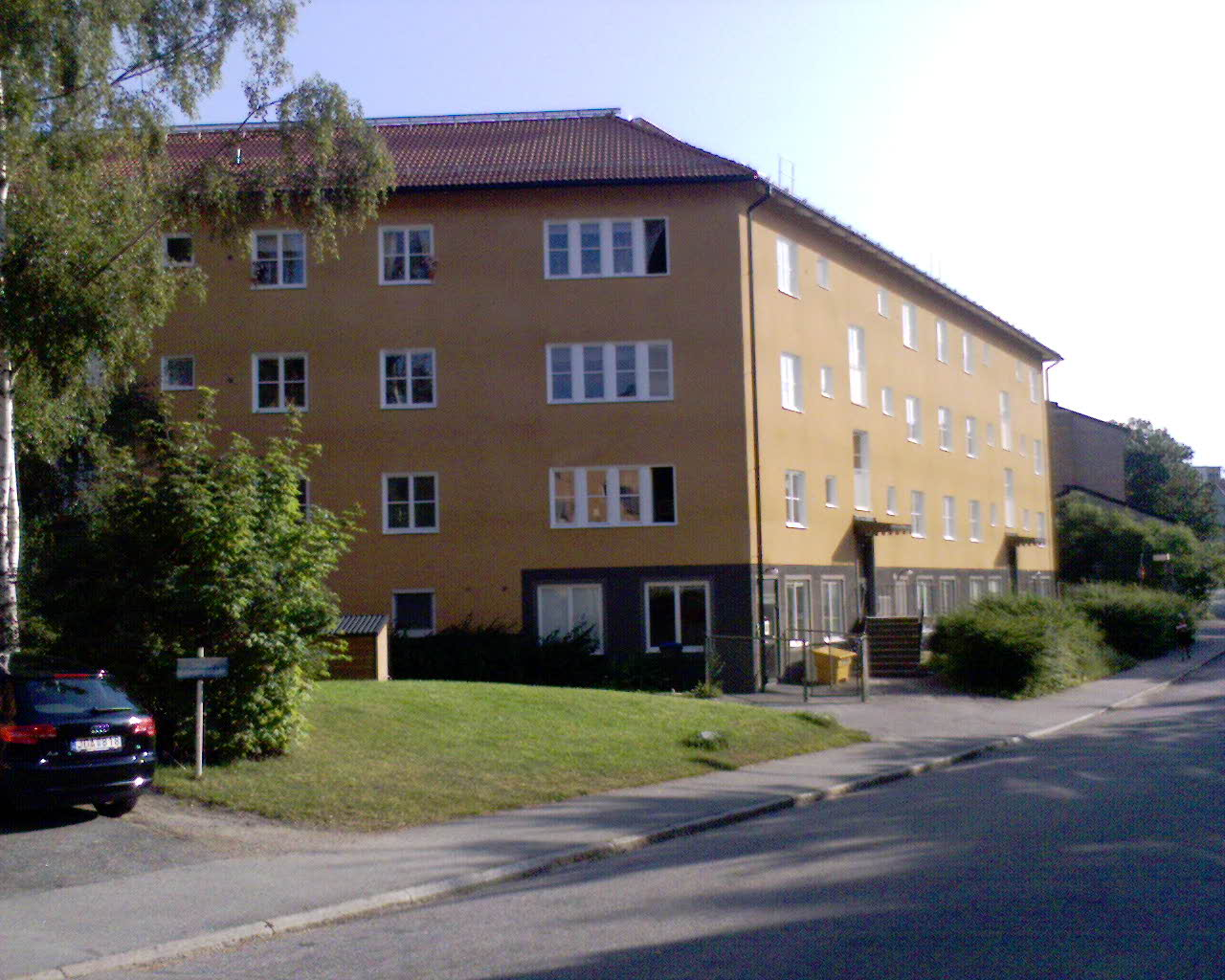 Ottsjövägen 10-12, Årsta, Stockholms kommun. Huset ritades av Adrian Langendahl och uppfördes 1951.